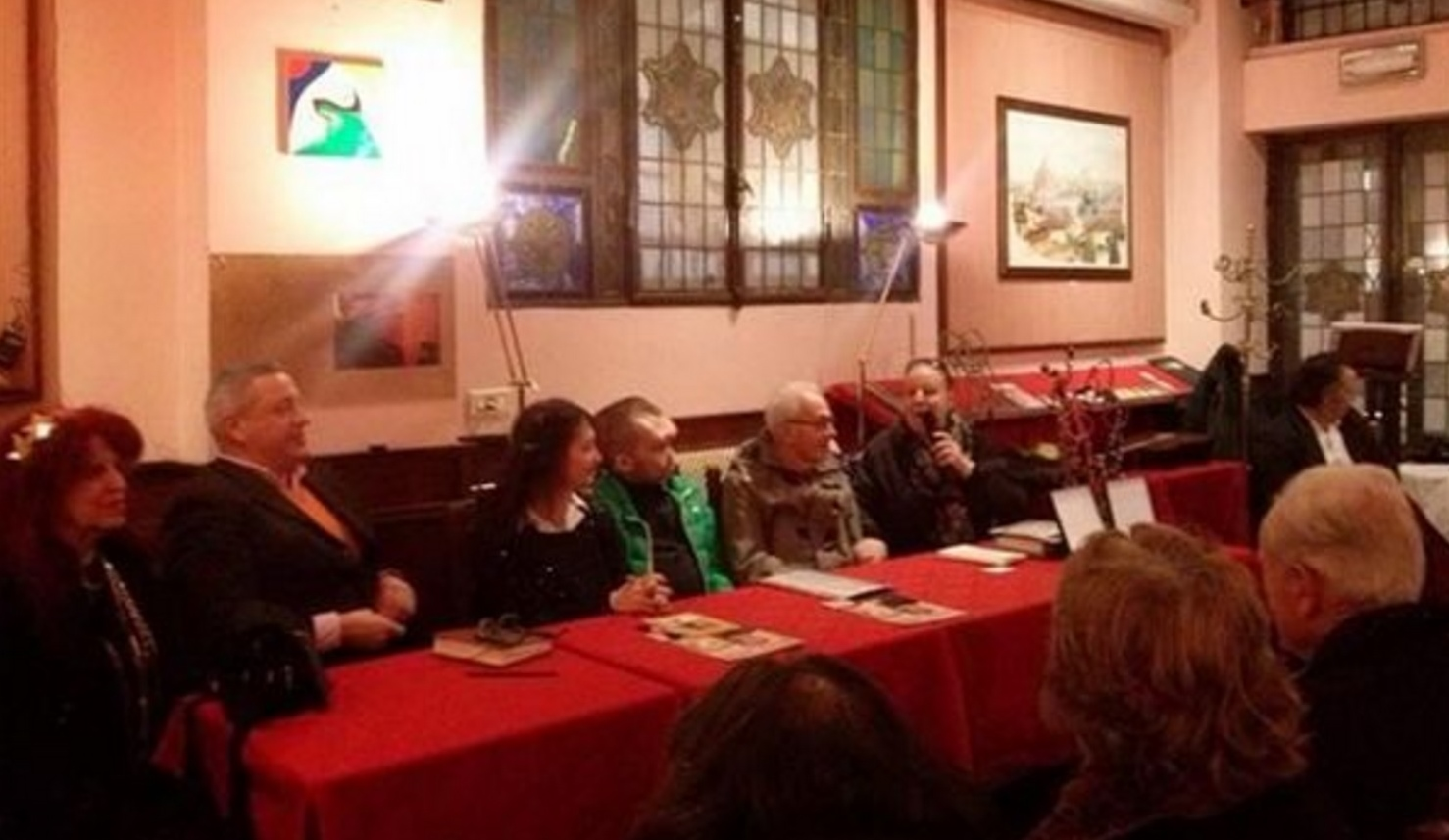 Pomeriggio letterario presso le Giubbe Rosse di Firenze